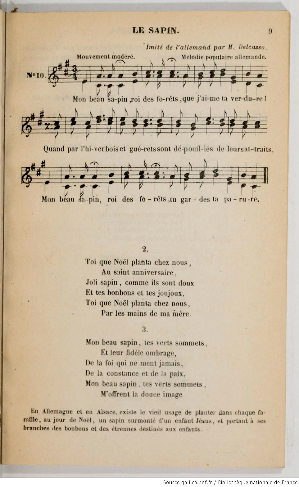 Le Sapin, version française (1856) de la chanson allemande O Tannenbaum, couramment intitulée d’après son incipit Mon beau sapin. Paroles de Laurent Delcasso (1797-1887), recteur de l’académie de Strasbourg. Arrangement musical de Pierre Gross (1823-1867), maître adjoint à l’école normale de Strasbourg. Source : DELCASSO, Laurent et Pierre GROSS. Recueil de morceaux de chant à une, deux et trois voix à l’usage des écoles normales et des écoles primaires, 2e édition revue et corrigée, Strasbourg, Dérivaux, 1856, p. 9.